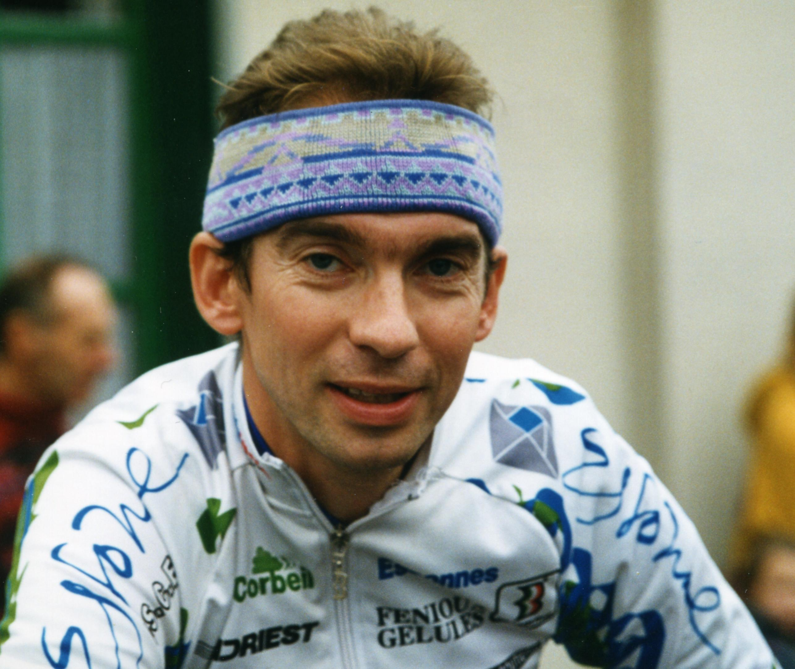 JUBILE PATRICE ESNAULT